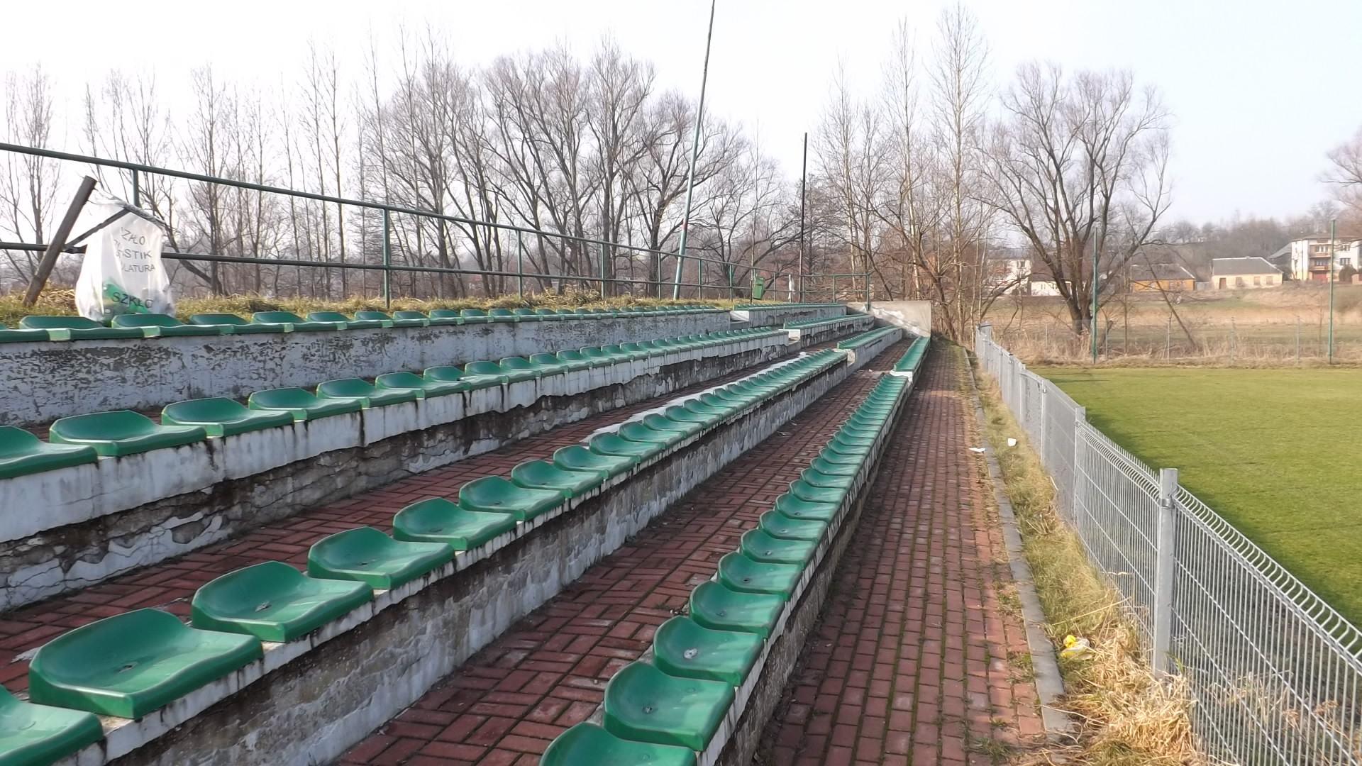 Zdjęcie trybuny południowej stadionu Polonii Iłża